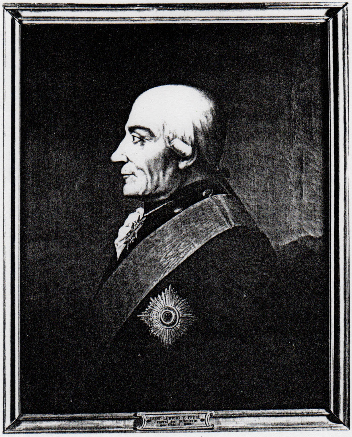 Ernst Ludwig von Pfuhl (Pfuel) (* 8. Dezember 1716 auf Gut Plagow, Neumark; † 5. Mai 1798) war ein königlich-preußischer General der Infanterie, Gouverneur der Zitadelle Spandau, Amtshauptmann von Potsdam, sowie Generalinspekteur der brandenburgischen Infanterie.